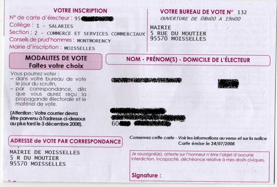 carte électorale pour les élections aux conseils de prud'hommes